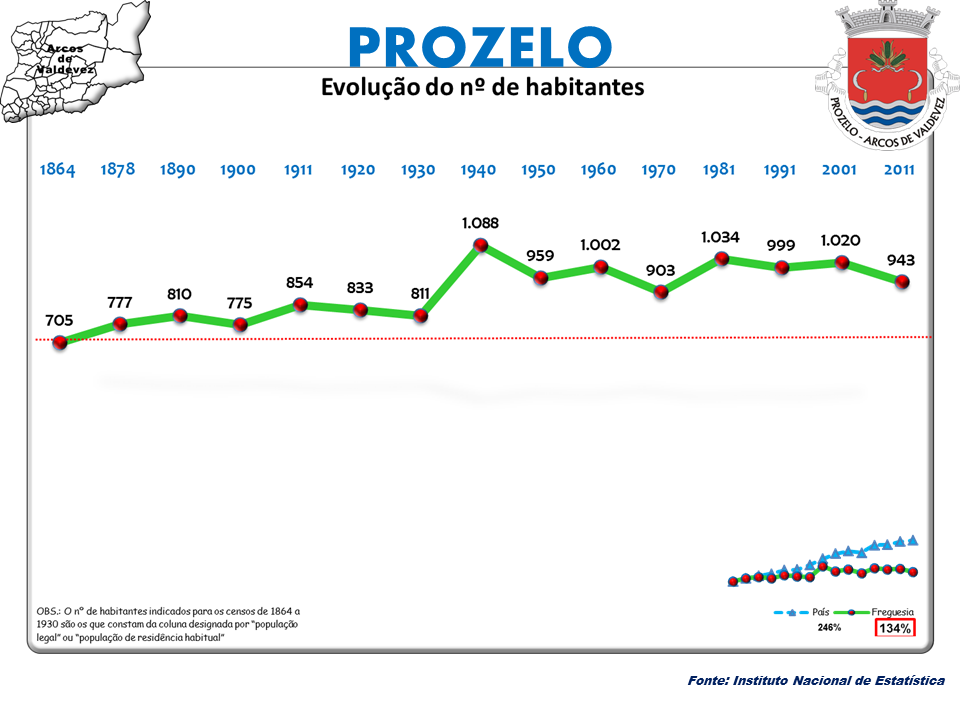 Censos 1864/2011